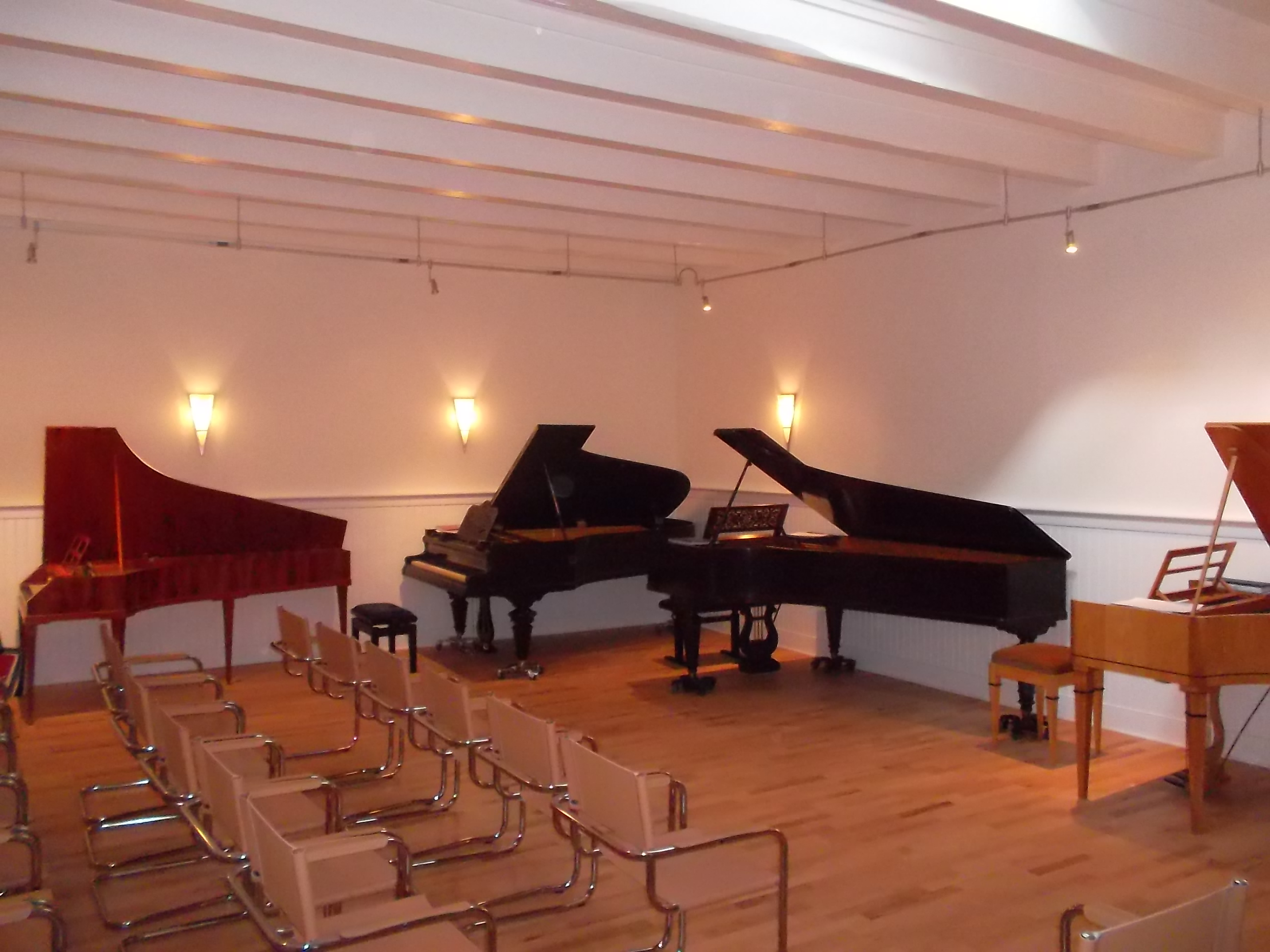 Musikssal in Göttingen